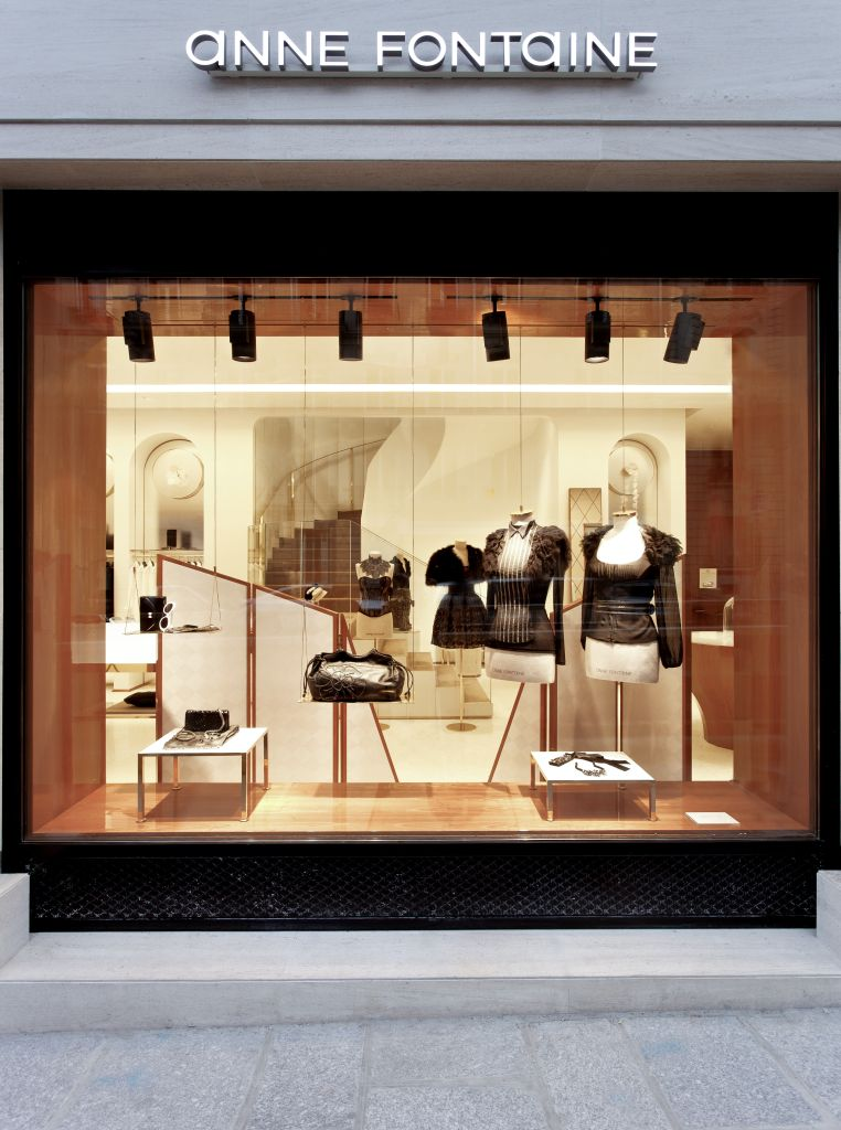 17 rue François 1er, 75008 Paris, France